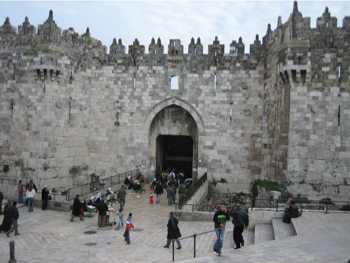 Damascus Gate in Jerusalem. / Damaščanska vrata u Jeruzalemu.